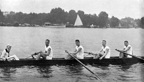 Junior-Vierer des R.C. "Werder" Magdeburg am 27.Mai oder 16./17.Juni 1923 in Berlin Grünau. Der sogenannte "Hoffmann"-Vierer mit G. Schultz, Günther Dankworth, Walter Meyer, 1932 Olympiasieger im 4+ in Los Angeles, Günther Hoffmann und Stm. Werner Fischer